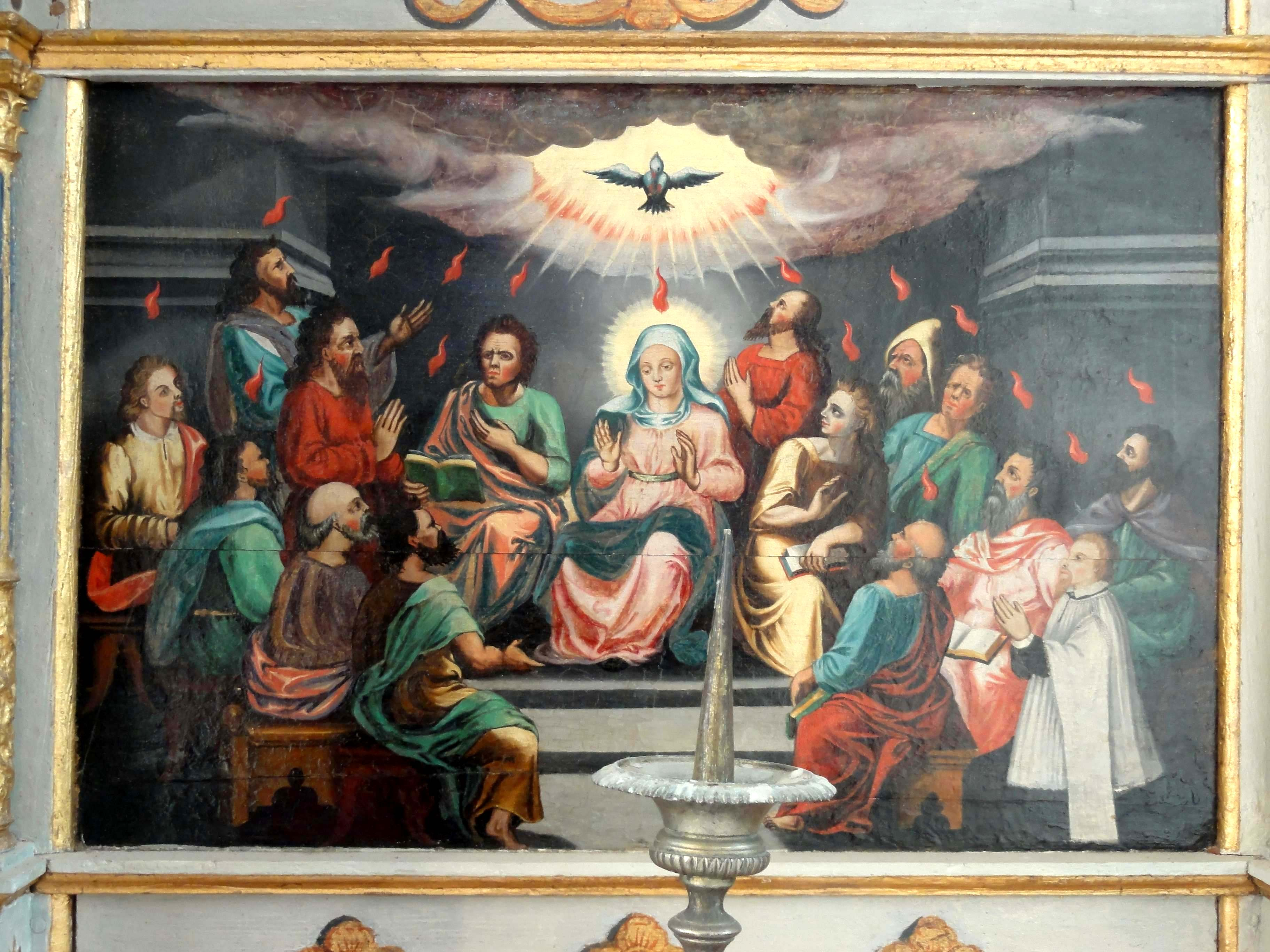 Mobilier de l'église Saint-Sulpice de Béthancourt-en-Valois - voir titre.